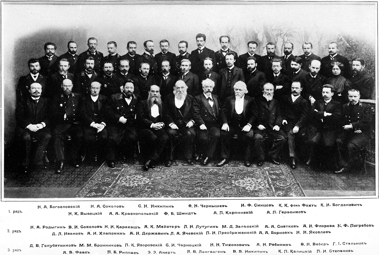 Юбилейная группа Геологического комитета 1988-1907